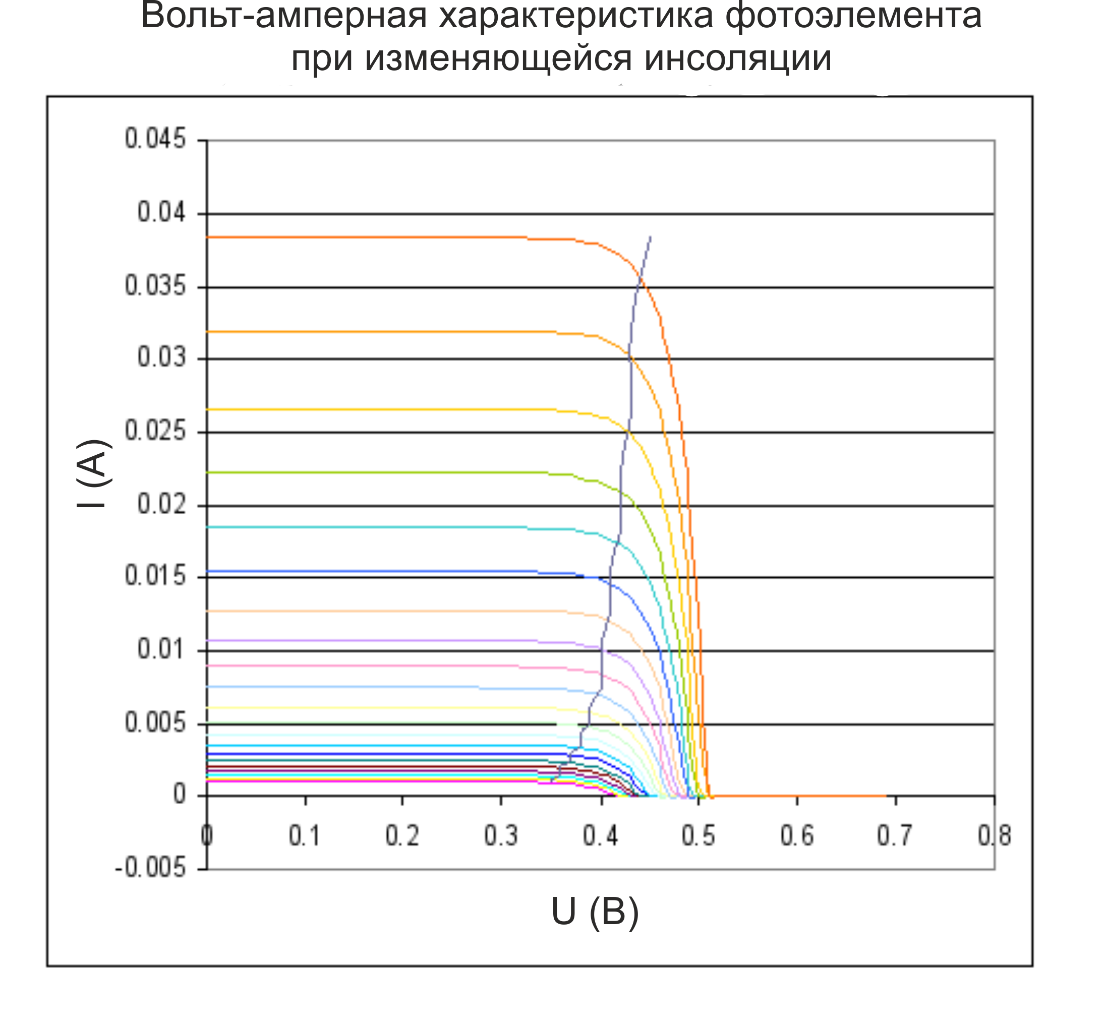 Вольт-амперная характеристика фотоэлемента при изменяющейся инсоляции